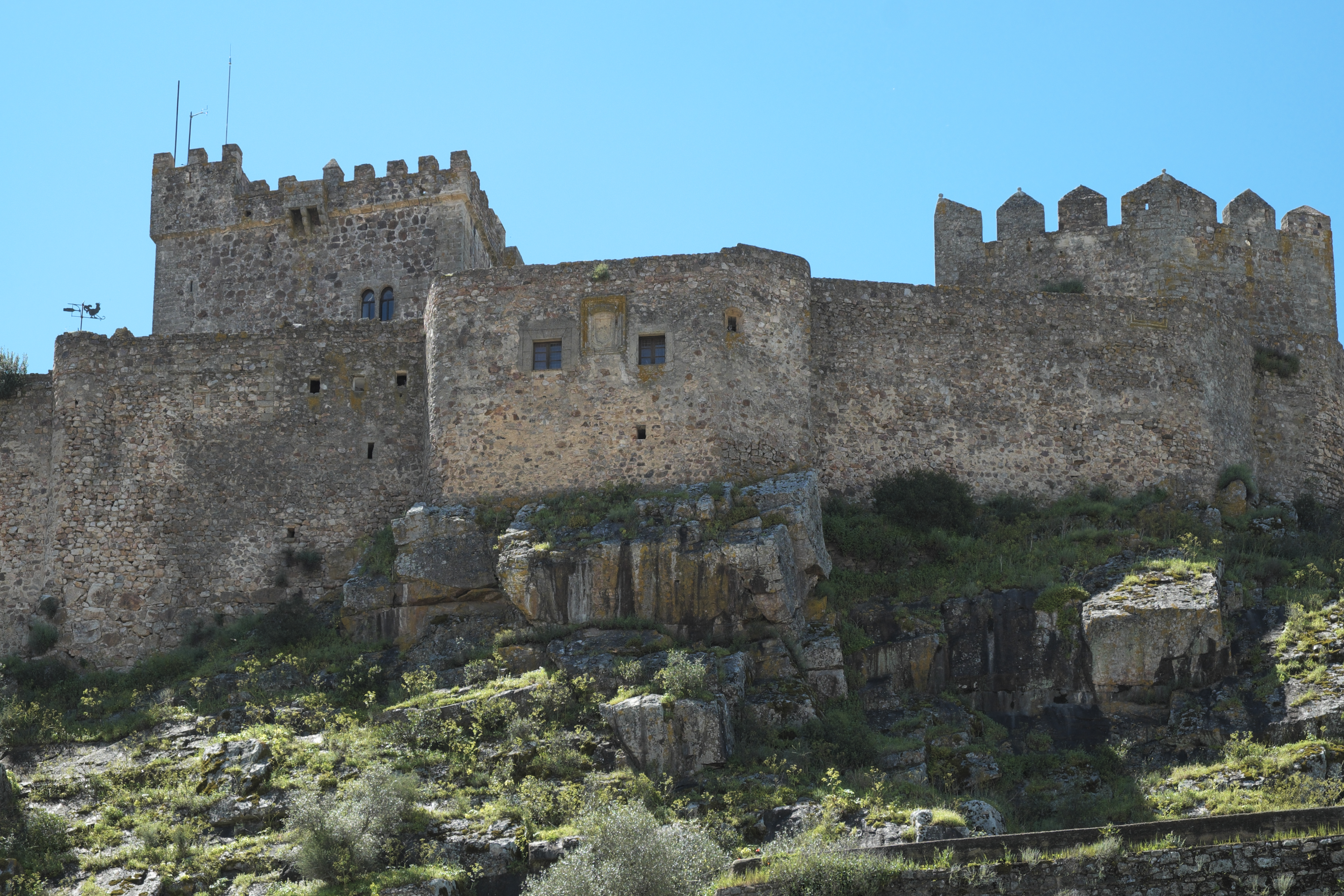 Castillo de Alburquerque in Alburquerque in der Provinz Badajoz Extremadura/Spanien)